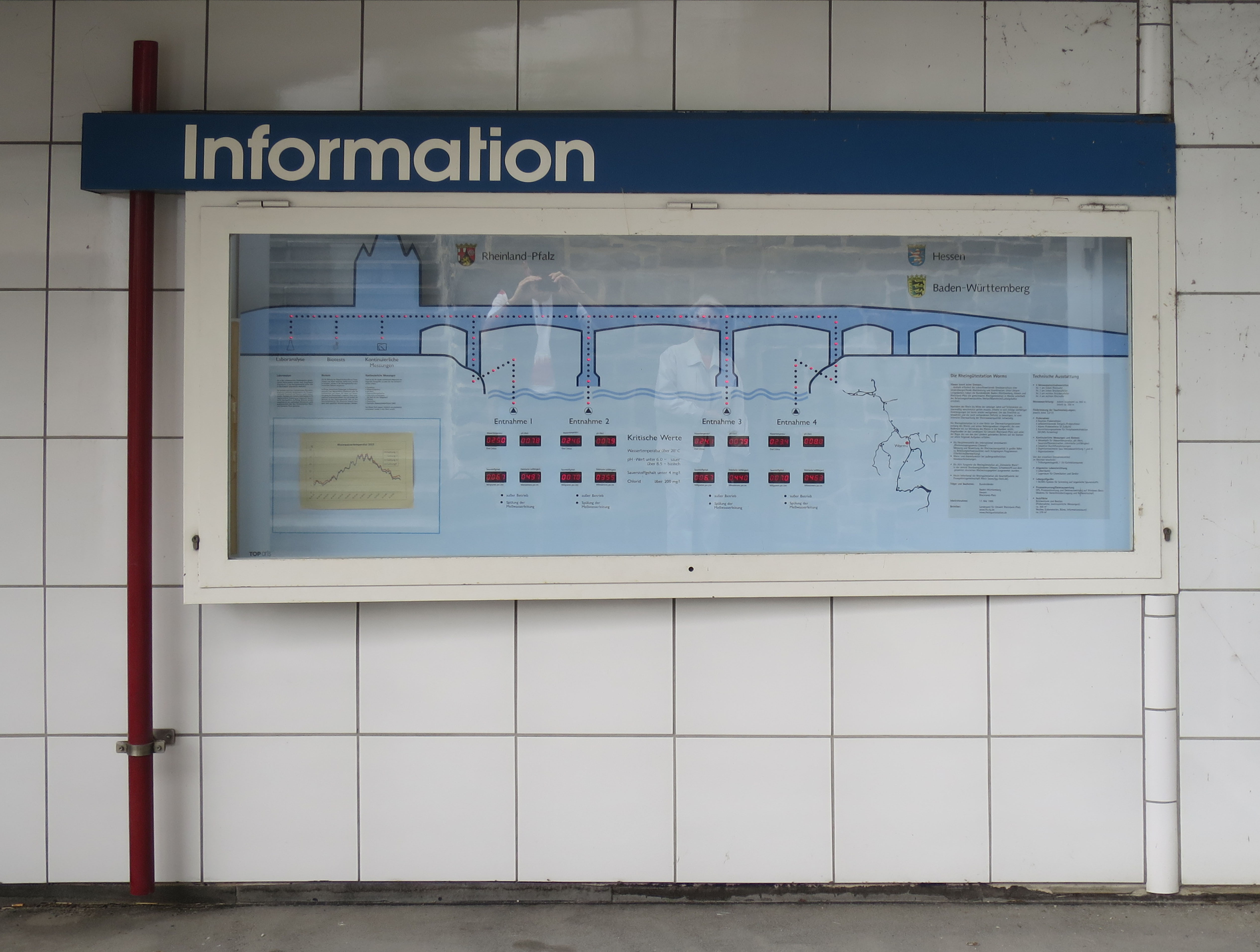 Die Rheingütestation Worms ist eine Messstation, die dazu dient, die Wasserqualität des Rheins zu überwachen. Inhaltsverzeichnis